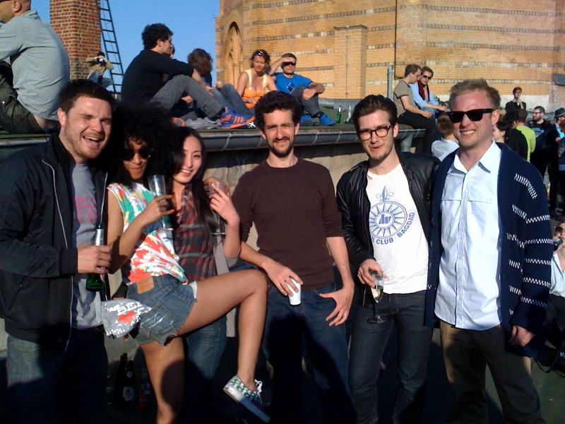 Roof top party at Soundcloud Berlin 2009